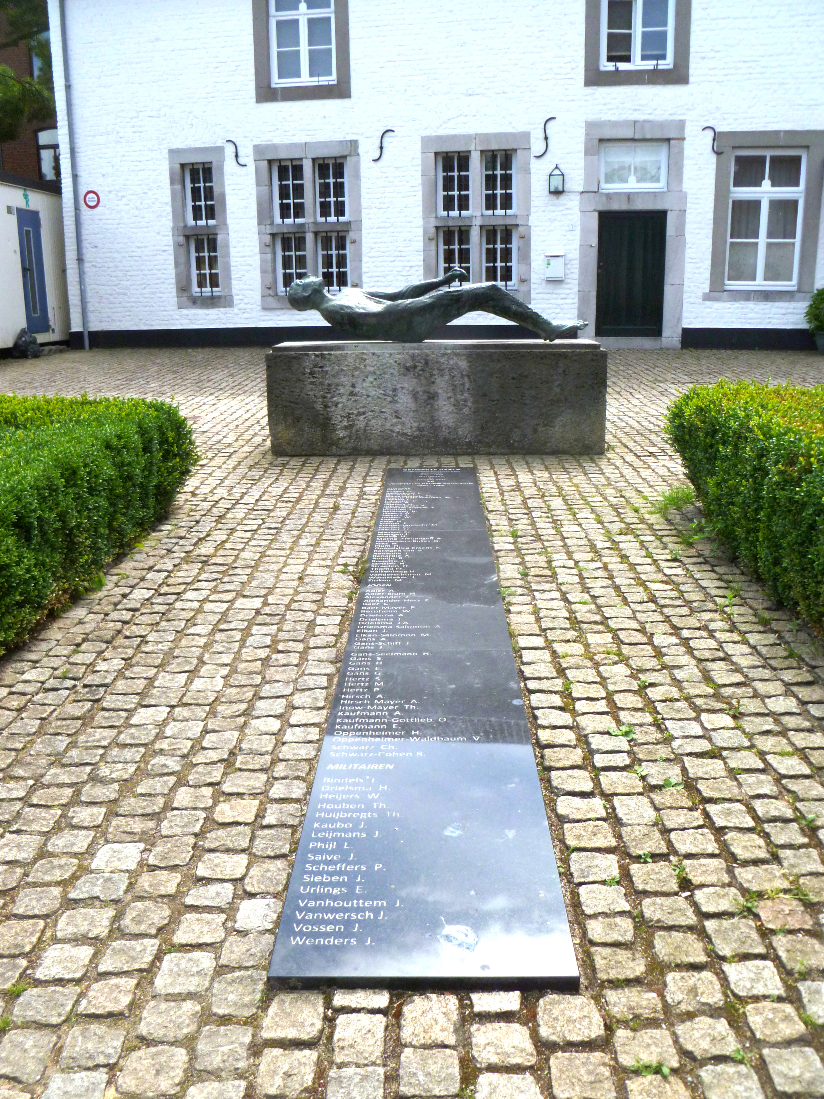 Denkmal für die Gefallenen des zweiten Weltkrieges in Vaals, von Clermontplein